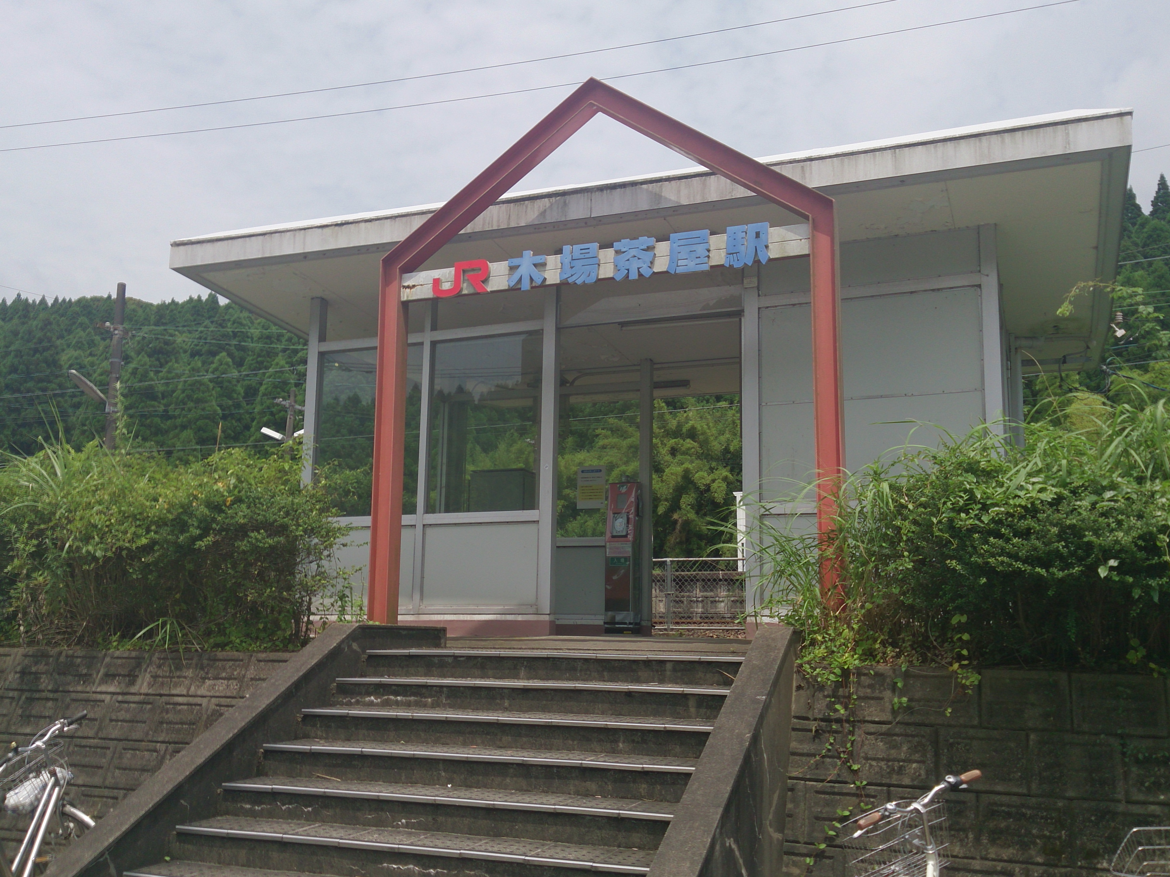 木場茶屋駅駅舎